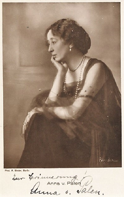 Anna von Palen (signed)